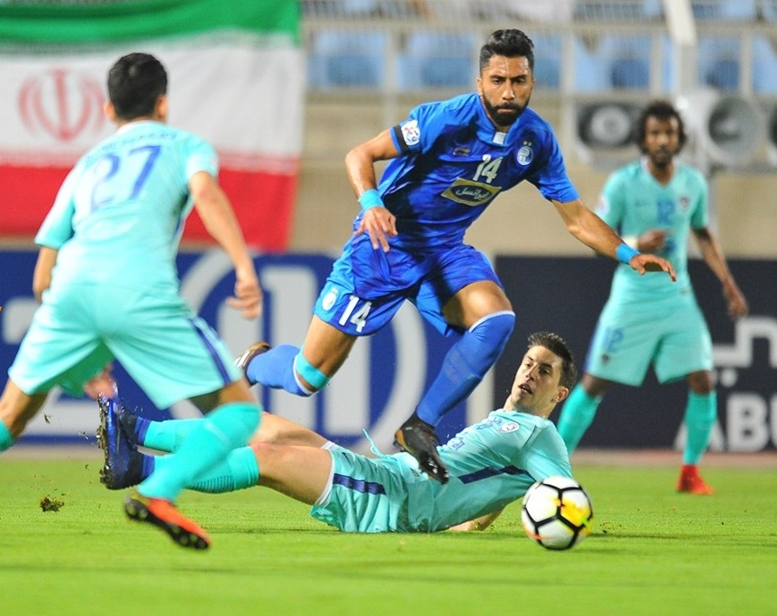 فرشید باقری در لباس استقلال در بازی مقابل الهلال عربستان در لیگ قهرمان آسیا